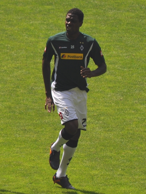 Idrissou beim Aufwärmen gegen Liverpool